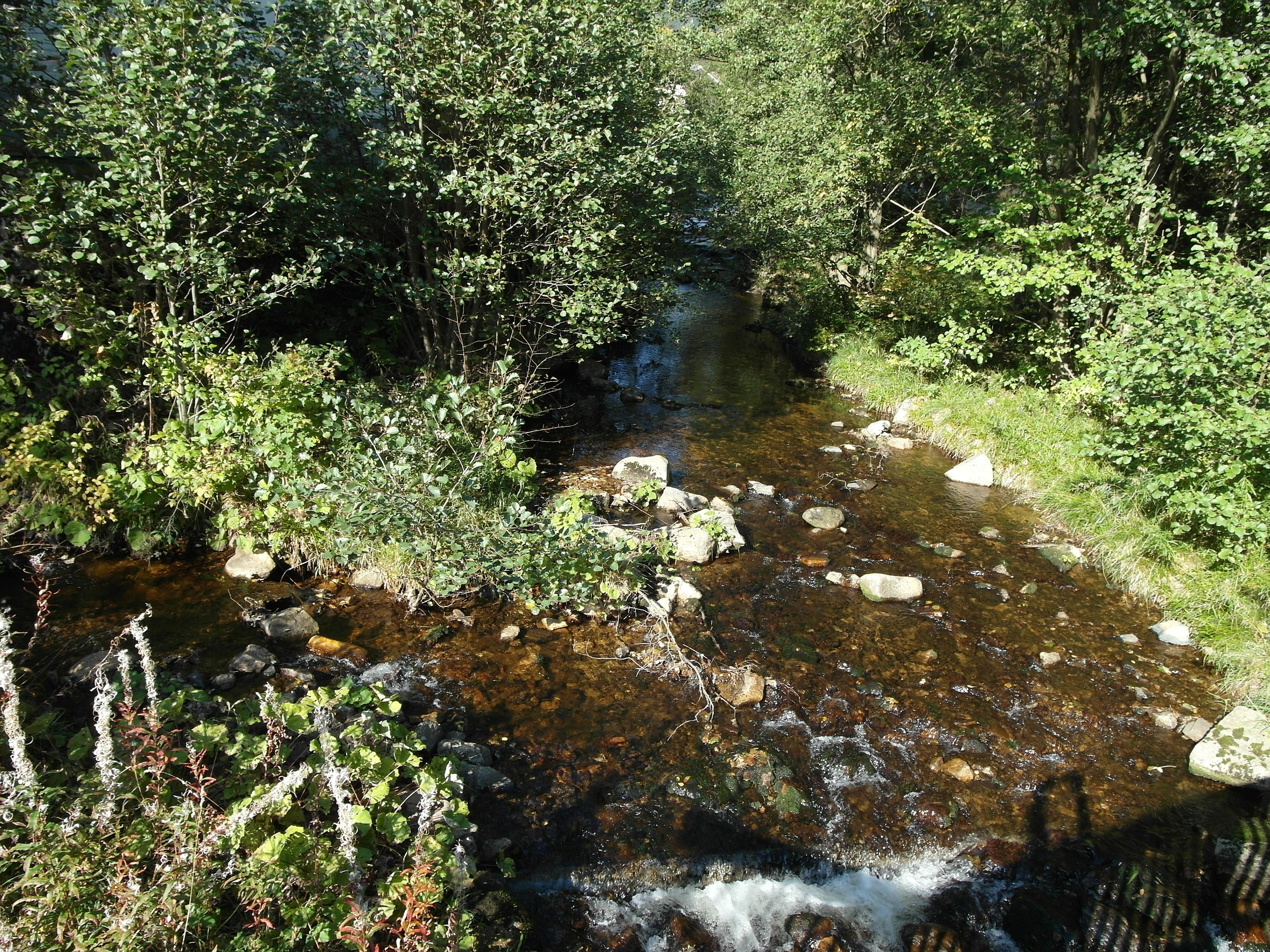 Einmündung des Ulrichswassers (links) in die Warme Bode am nördlichen Ortseingang von Braunlage